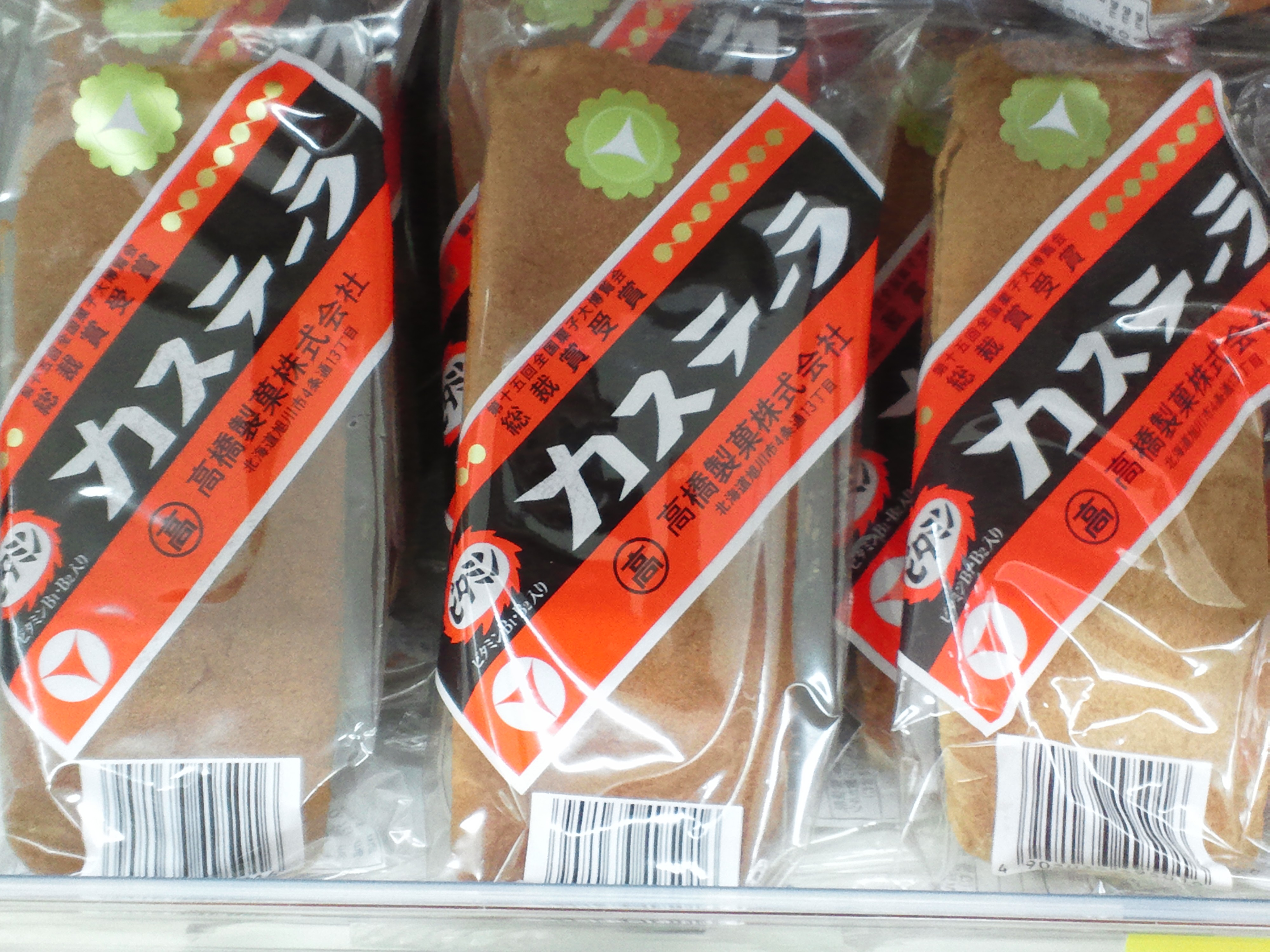 Asahikawa-City Hokkaido TAKAHASHI-SEIKA making vitamin Kasutera